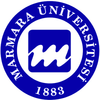 Logo der Marmara-Universität Istanbul